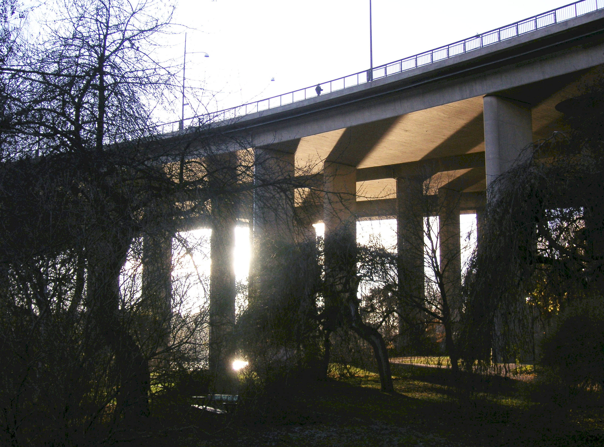 Broparken på Stora Essingen